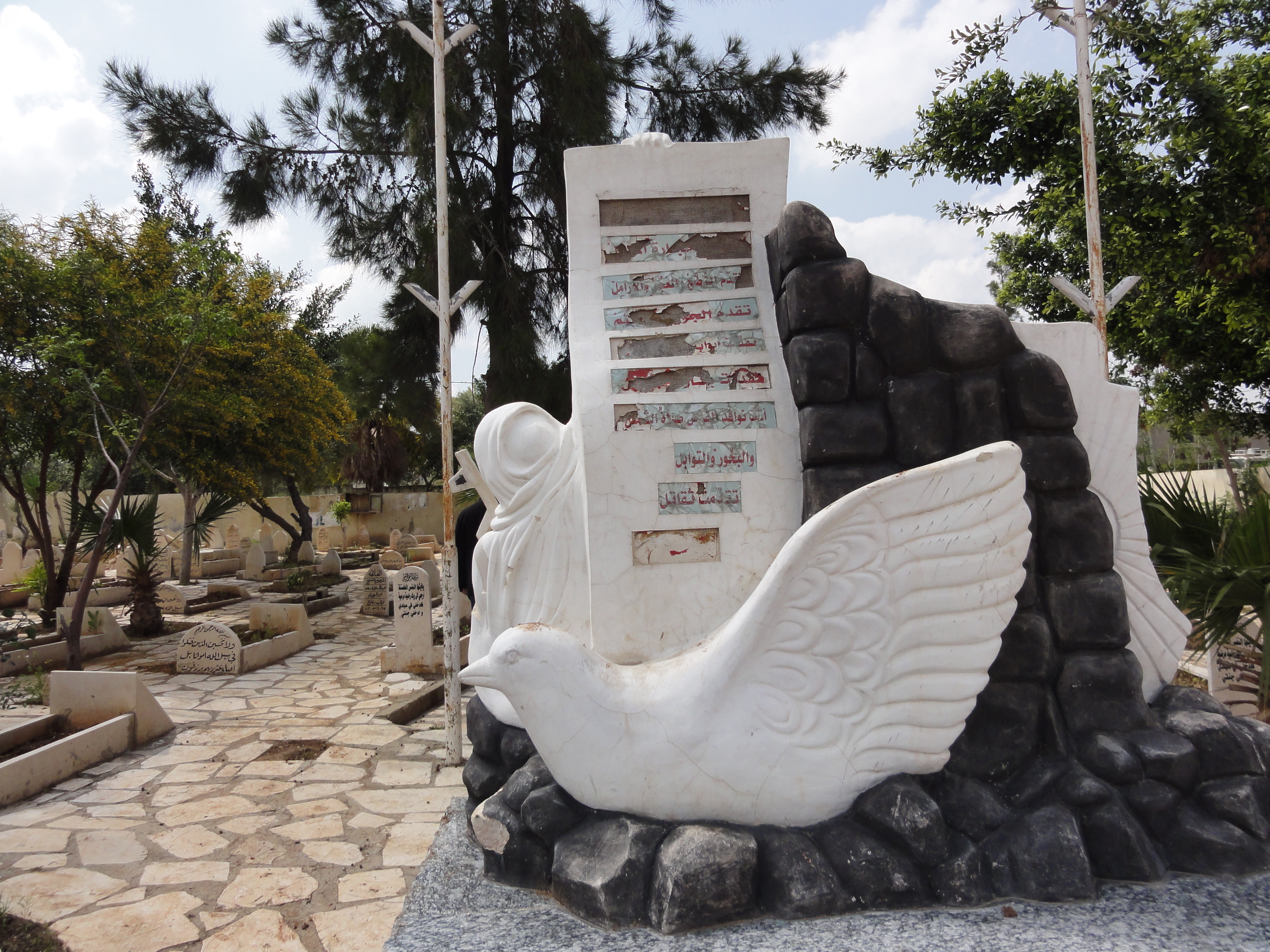 Jenin massacre monument